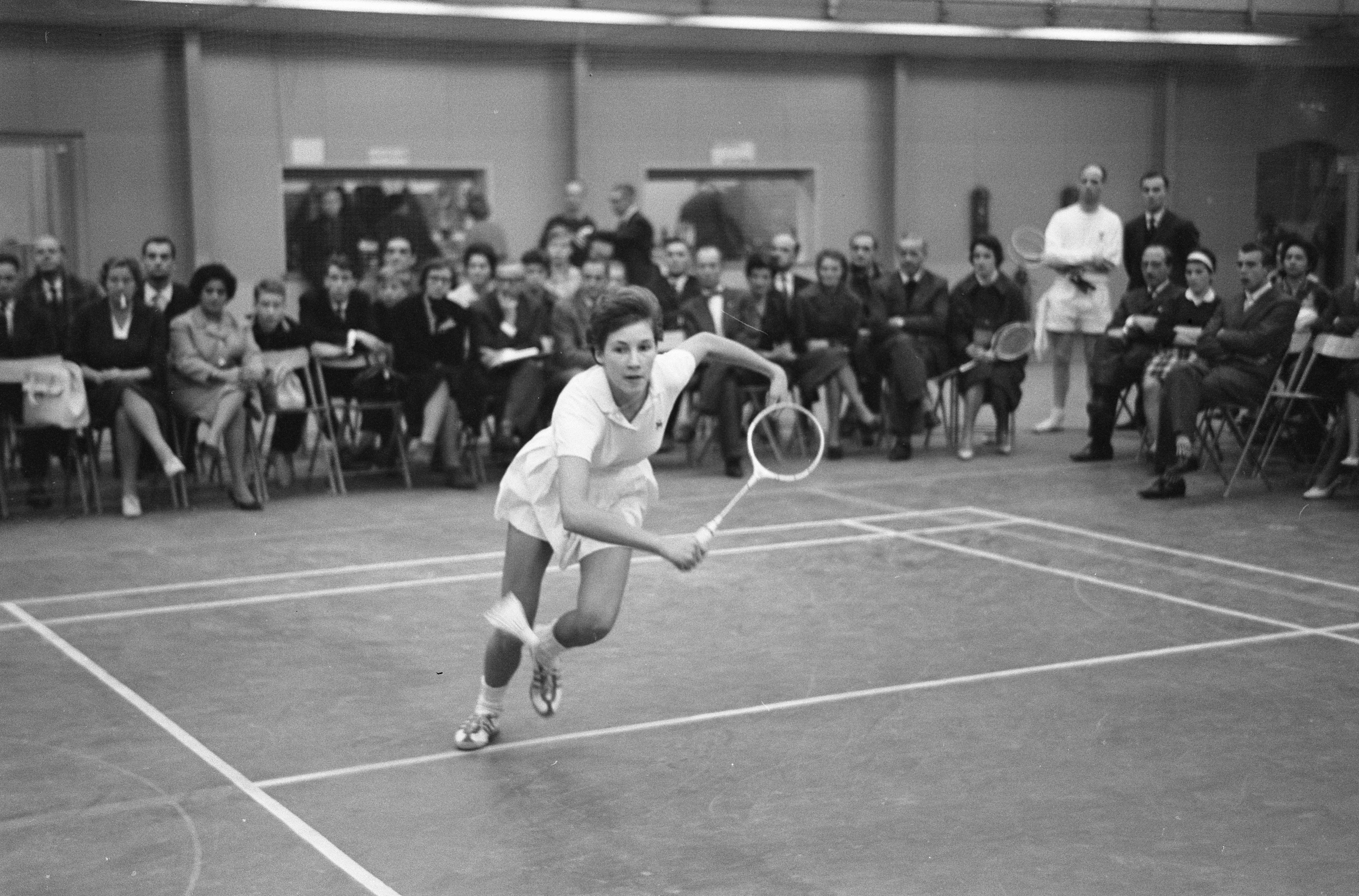 Collectie / Archief : Fotocollectie Anefo Reportage / Serie : [ onbekend ] Beschrijving : Nationale Badmintonkampioenschappen te Eindhoven. Imre Rietveld tijdens de finale Datum : 10 december 1961 Locatie : Eindhoven Trefwoorden : Badminton, finales, kampioenschappen Fotograaf : Pot, Harry / Anefo Auteursrechthebbende : Nationaal Archief Materiaalsoort : Negatief (zwart/wit) Nummer archiefinventaris : bekijk toegang 2.24.01.05 Bestanddeelnummer : 913-2750